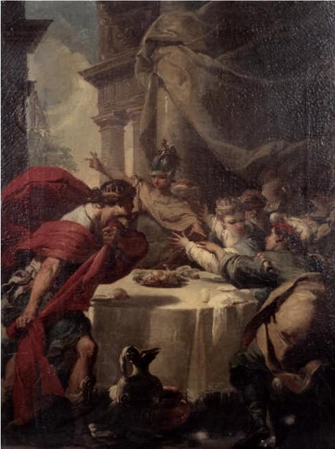 Scene at a classical banquet